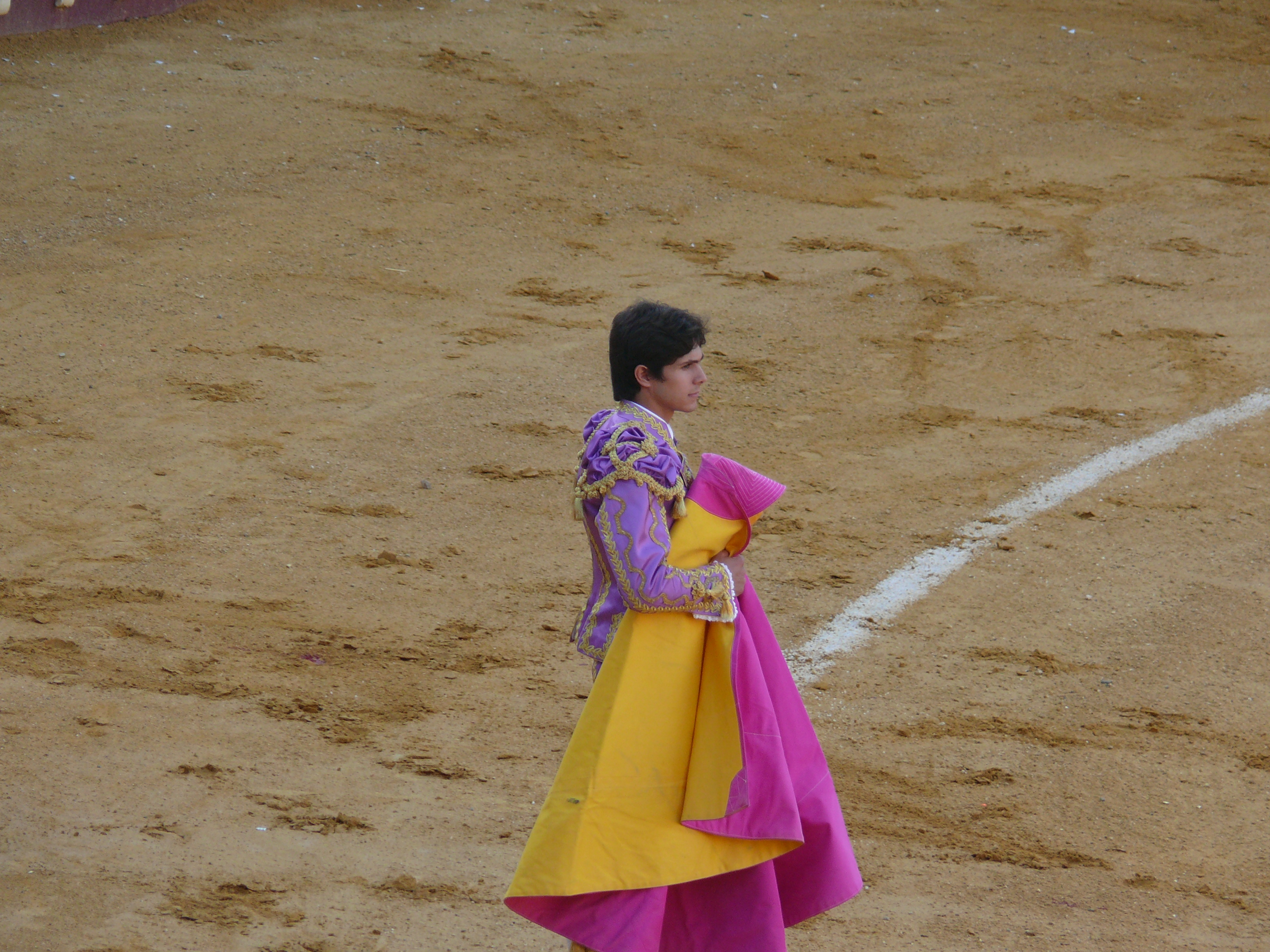 Sebastián Castella el día 24 de Agosto de 2009 en la Plaza Real de Toros de El Puerto de Santa María, en el tercio de varas del toro que lidió Morante de la Puebla en una corrida goyesca mostrando un terno en magenta y oro .